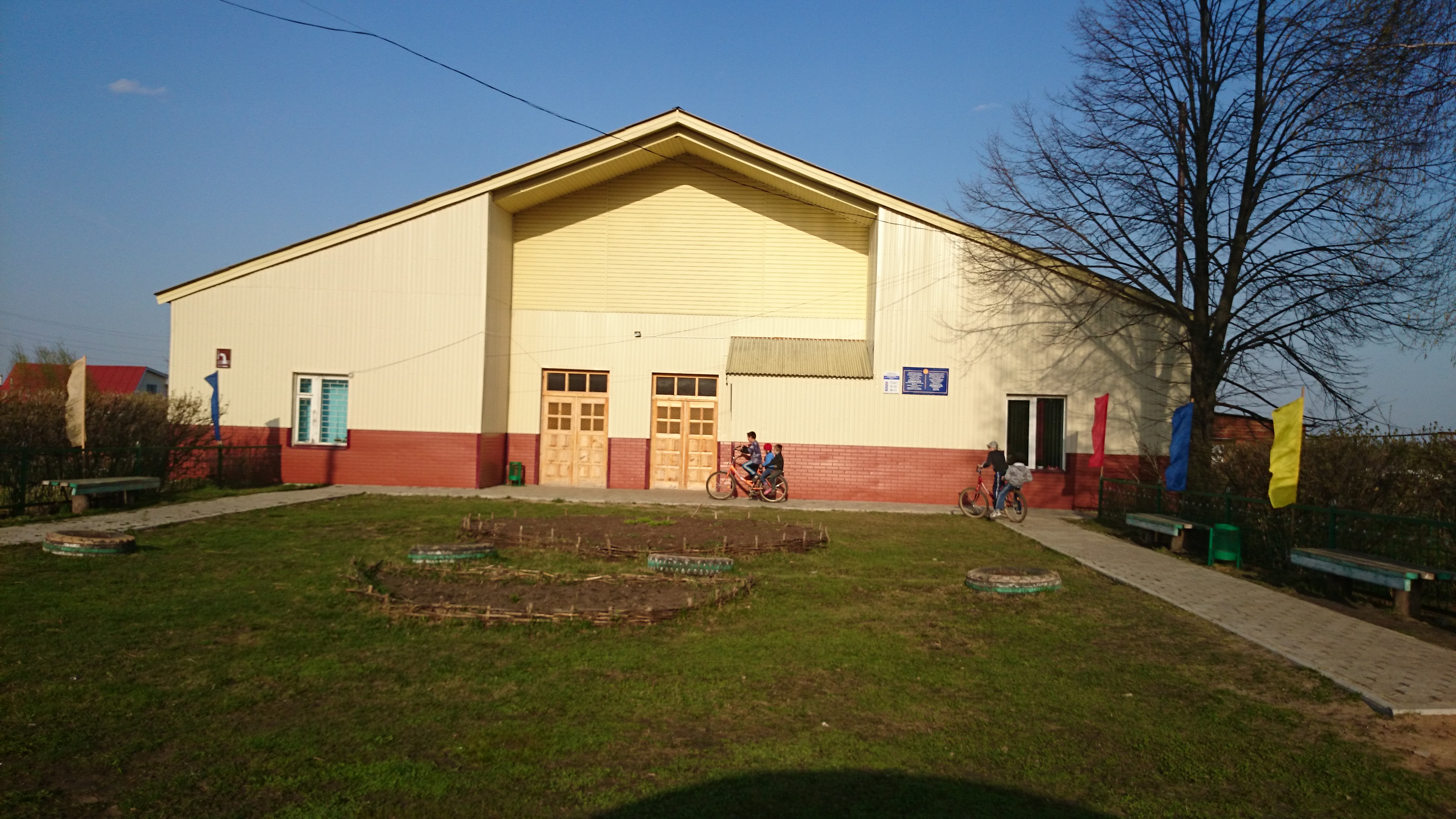 Климово 2 мая 2014